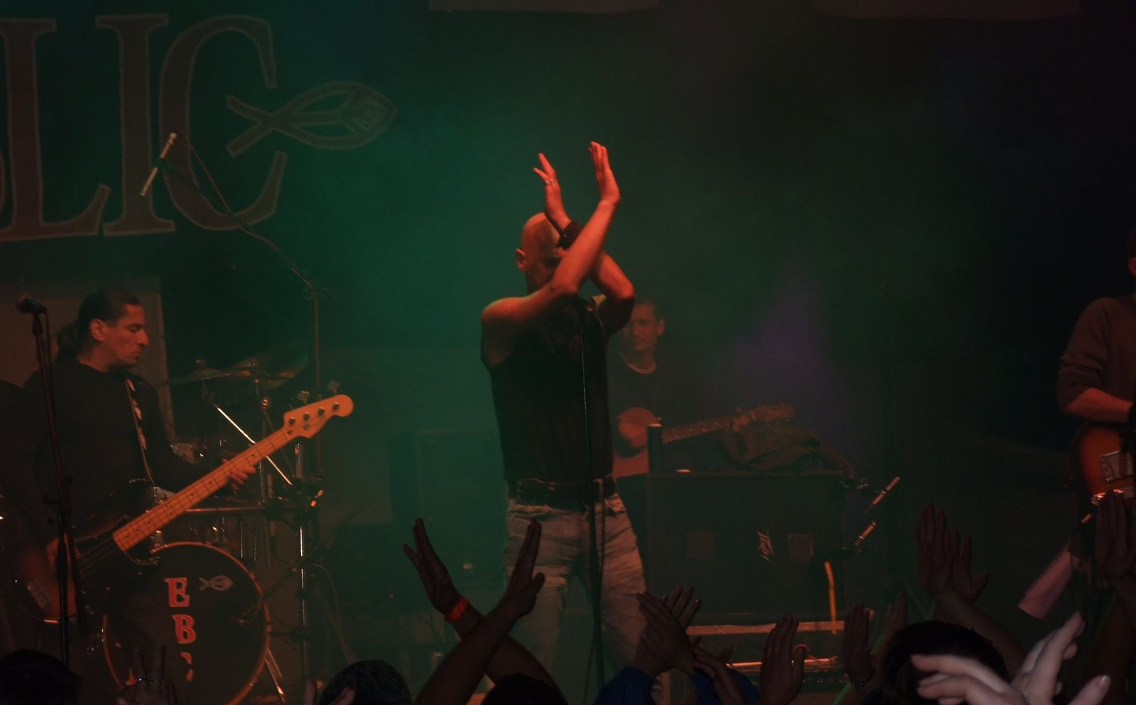 A Republic együttes koncertje 2010-ben a SzeptemberFeszt-en.